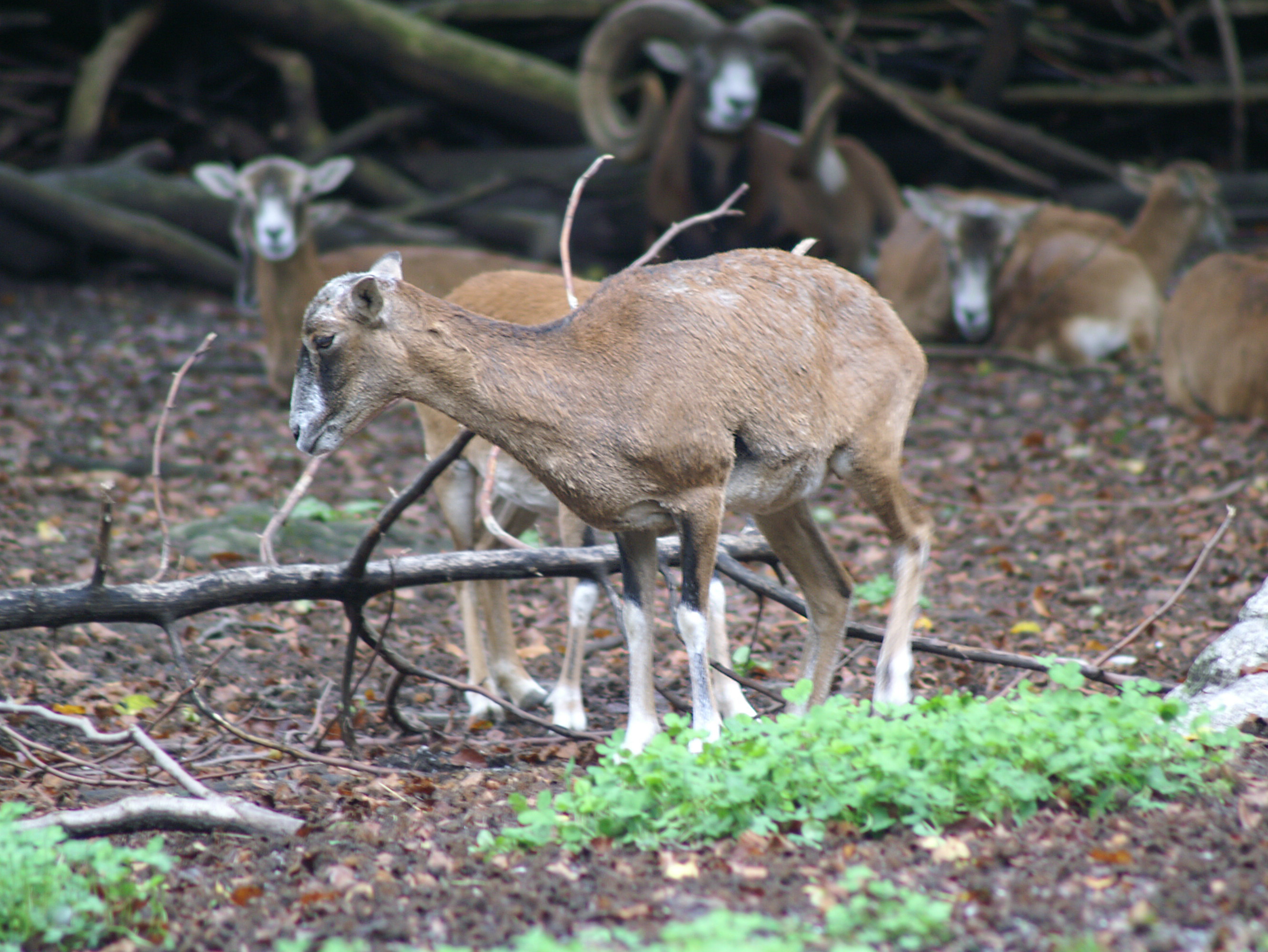 Mufflon fotografiert im Tierpark Bern